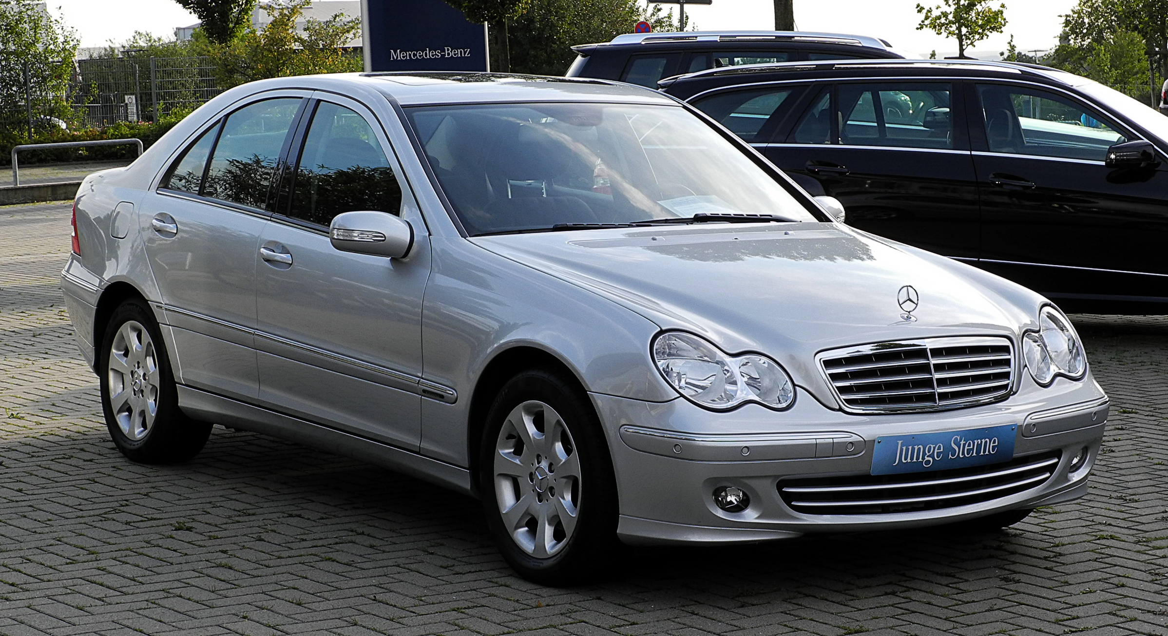 Mercedes-Benz C 230 Elegance (W 203, Facelift)